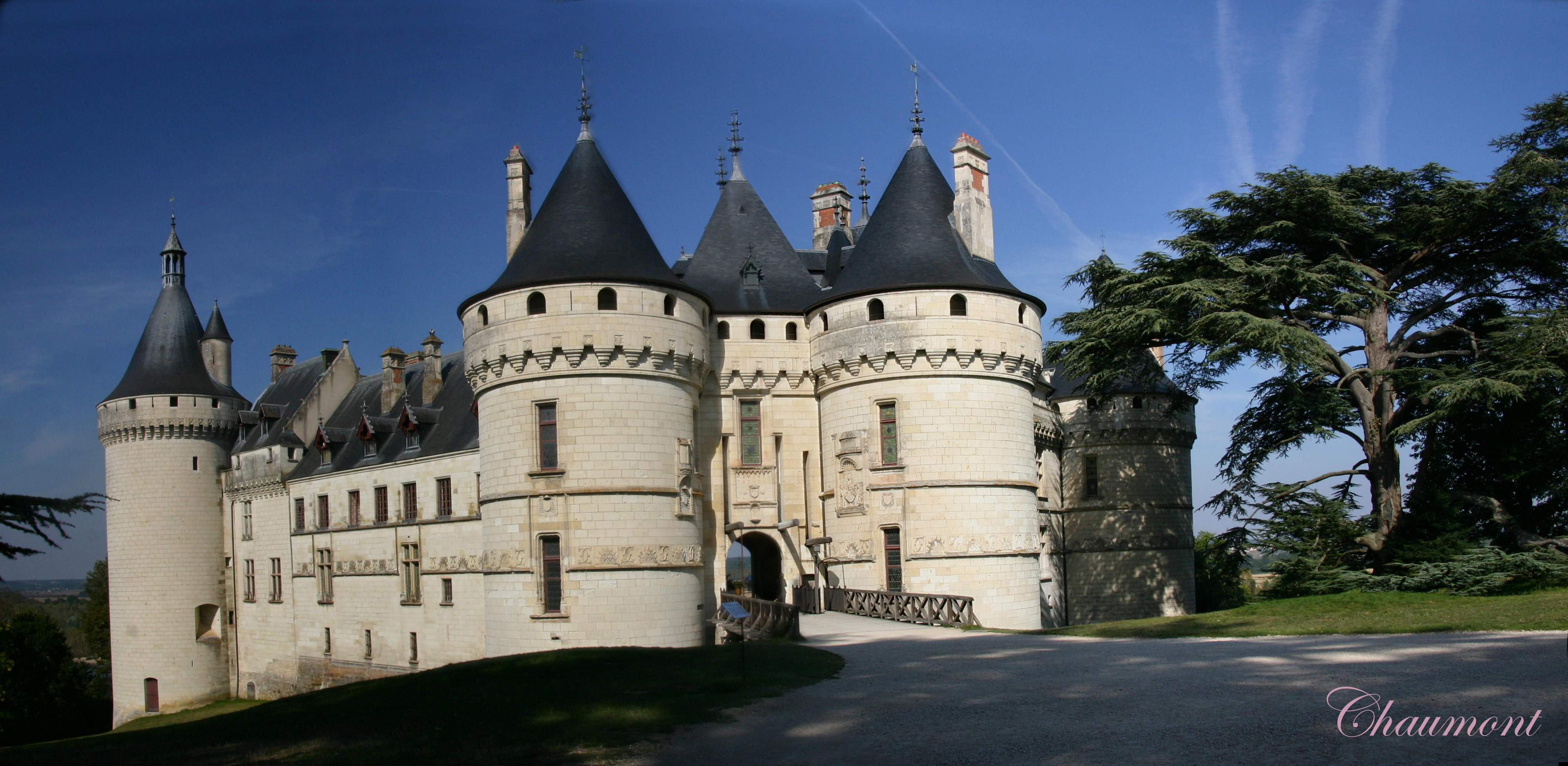 Château de Chaumont-sur-Loire